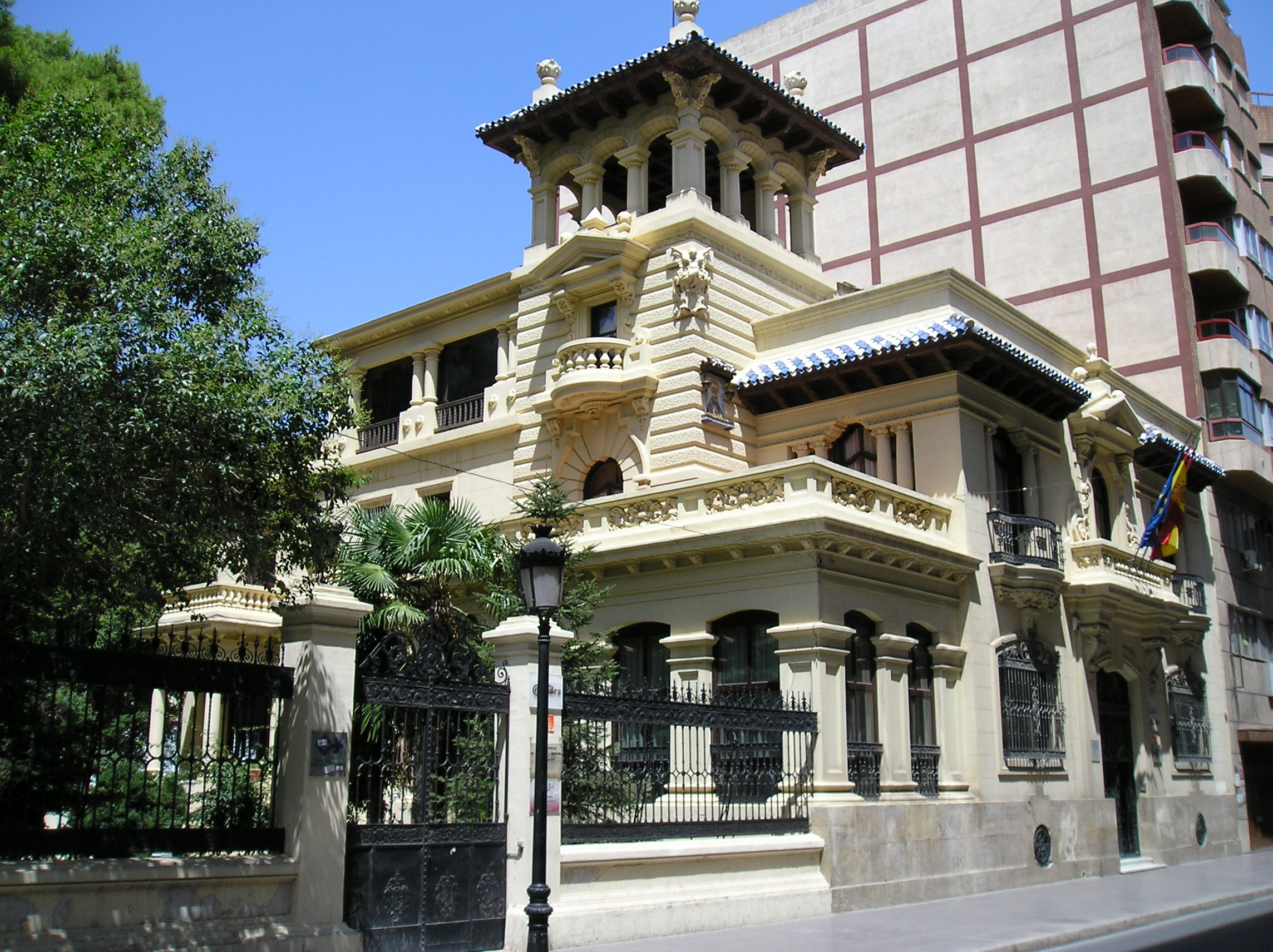 Cámara de Comercio de Albacete. Palacio de la Camara de Comercio de Albacete.